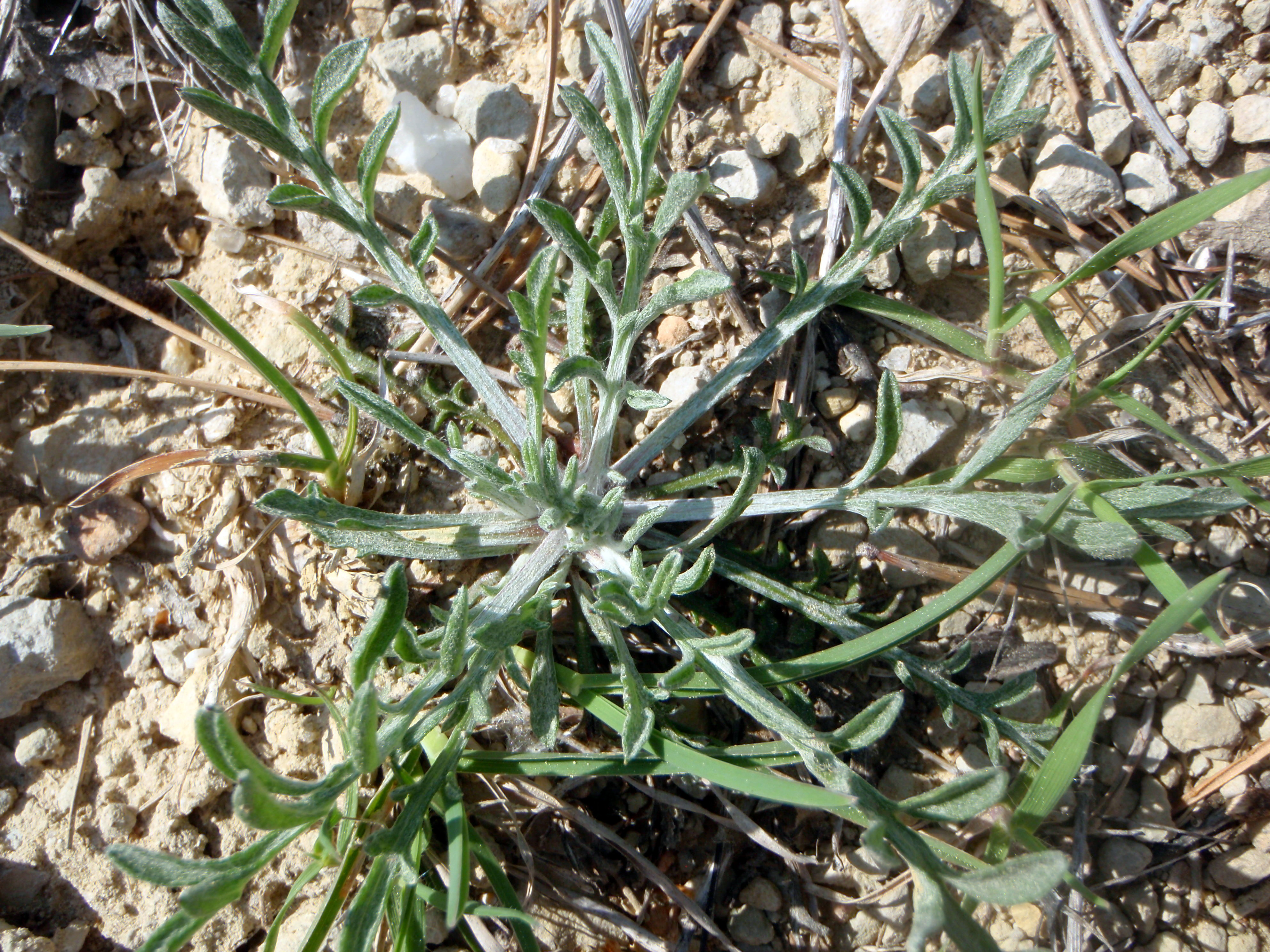 Centaurea paniculata (garmoncilla, escobillas) - Roseta basal de hojas. - Rognes (Departamento des Bouches-du-Rhône, Francia)